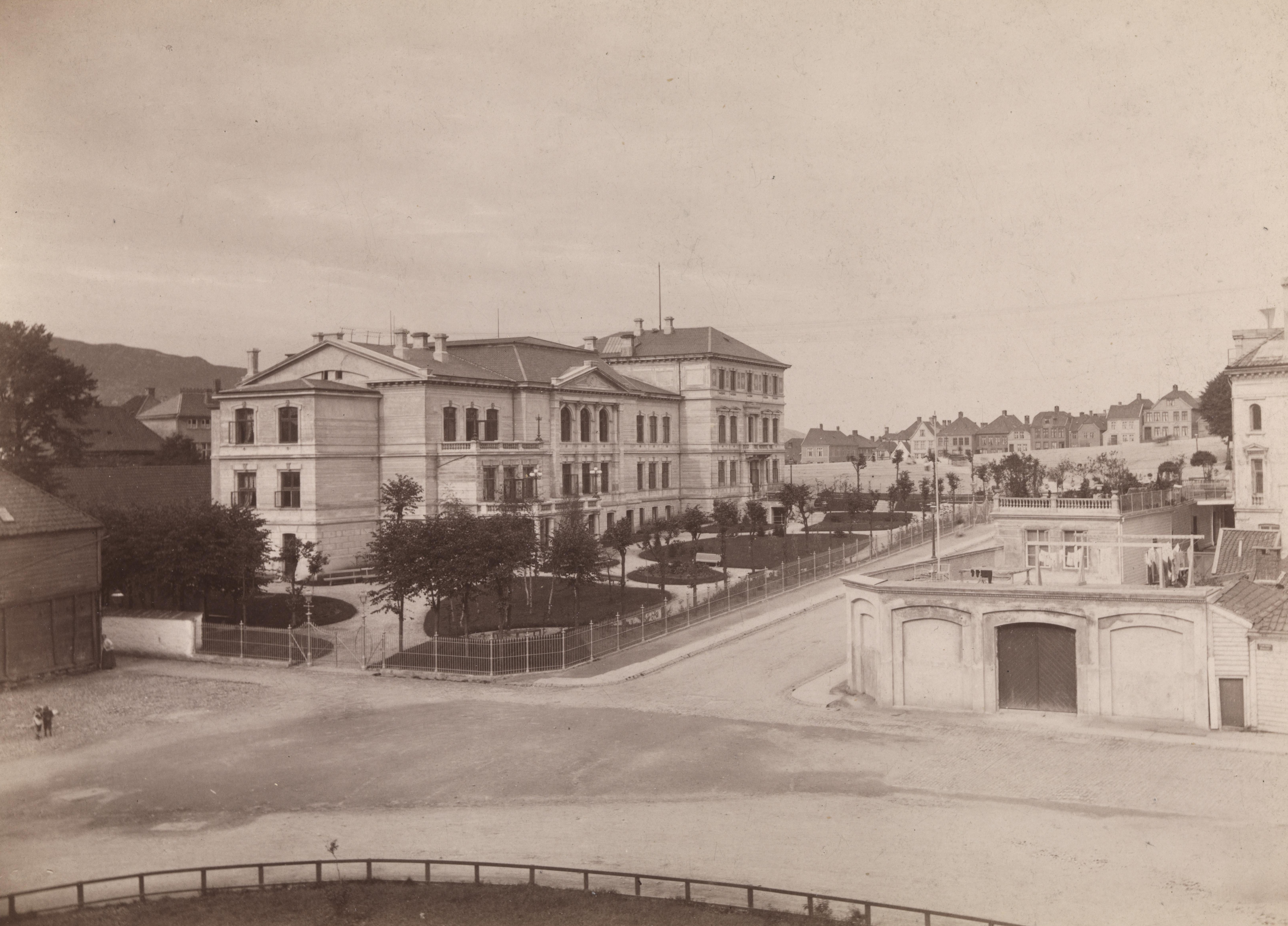 Sted: Kommune: Fylke: Tagger: bylandskap